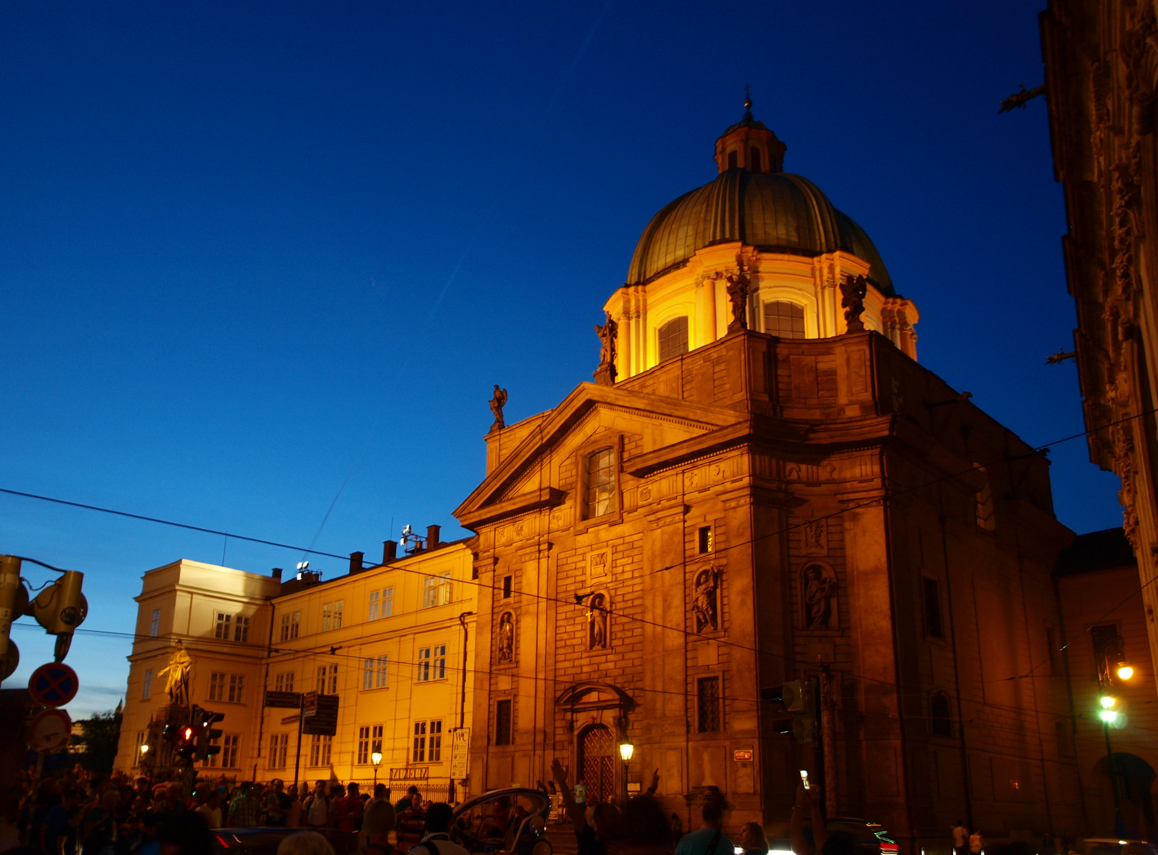 Praha, kostel sv. Františka z Assisi